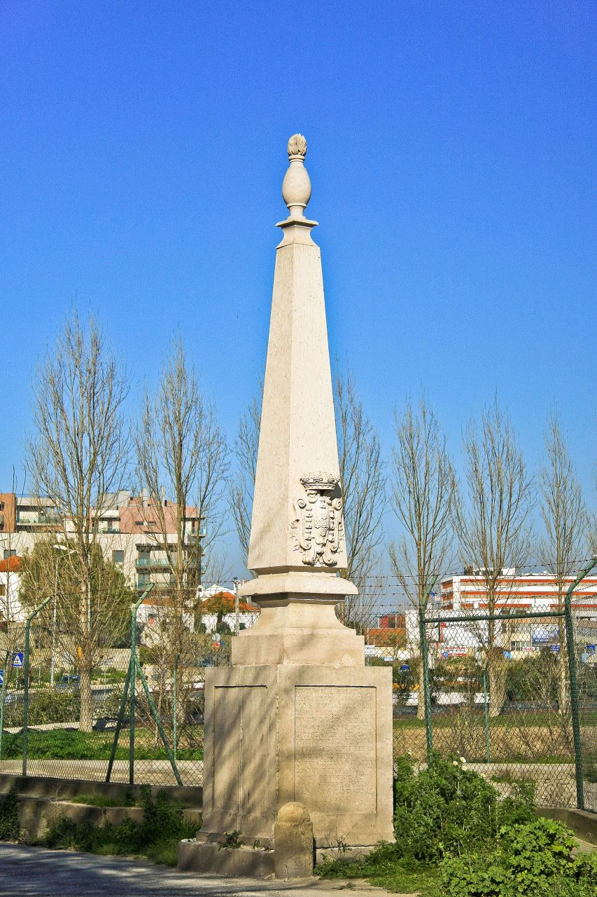 São dois. Foram mandados construir pela rainha D. Maria I em 1782. Situam-se na E.N. 10, entre Alverca e Forte da Casa (na realidade, hoje, estão no espaço desta última freguesia), junto às antigas portas de Lisboa. Os Obeliscos, um de cada lado da estrada, comemoram a construção da nova "Estrada Real" que saía da Encarnação e contêm as seguintes inscrições: -Obelisco do lado esquerdo, na ida para Lisboa: "Matia I Máxima, Providentíssima e Pia Rainha Lusitana por Real resolução mandou que pela consignação aplicada para a reedificação das calçadas e limpeza da cidade de Lisboa, e seu termo, se fizesse esta estrada que tem de largura calçada vinte palmos, e por cada hum dos lados dez serem empedrados, e guarnecidos hum e outro lado de oliveiras". -Obelisco, do lado direito, para fora de Lisboa: " Princípio e termo de Lisboa. Aquela real resolução da mesma Senhora abrange a todas estradas e caminhos de termo da cidade de Lisboa em que estão plantadas oliveiras. O que tudo foi encarregado pela mesma Senhora ao dez.01 do Paço do Intendente Geral da Política da Corte e Reino Diogo Inácio Pina Manique. Em MDCCLXXXII tanto para comodidade dos variantes como também para o fruto das ditas oliveiras serviu para a Real Casa Pia e iluminação da cidade de Lisboa". See where this picture was taken. [?]